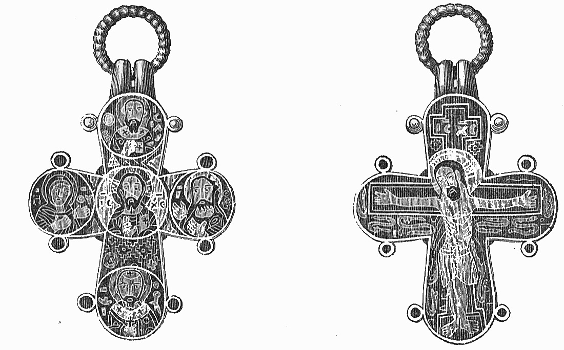 Dagmarkors; Kors fundet ved Dronning Dagmars grav i Sct. Bendts Kirke i Ringsted.